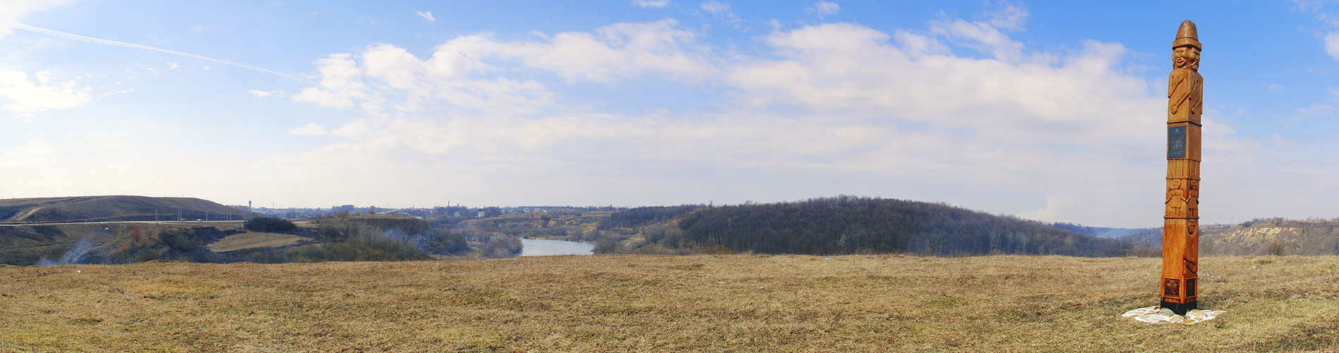 Городища літописного міста Возвягеля (2) і посад , с. Чижівка, на південний схід від села, правий берег р. Случ